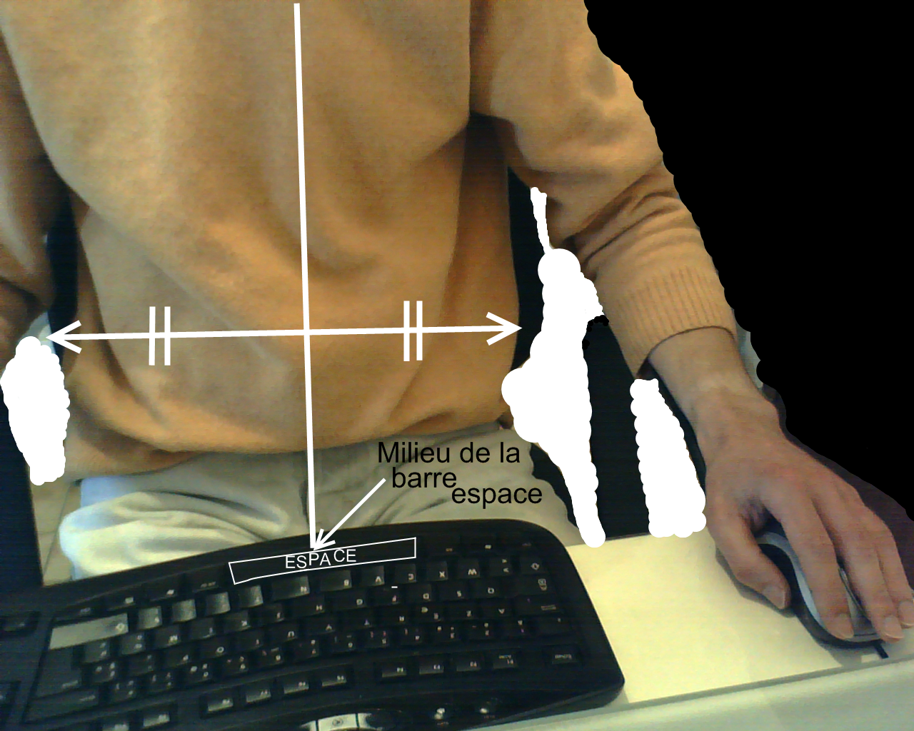 Disposition du clavier.